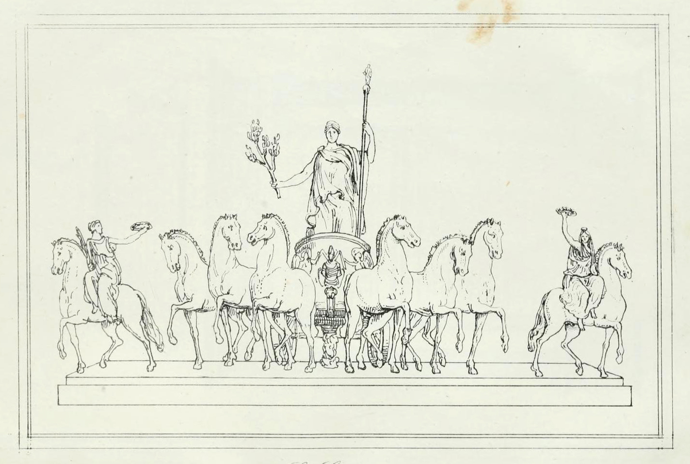 La Sestiga della Pace (Abbondio Sangiorgio, 1837), gruppo bronzeo sulla cima dell'Arco della Pace di Milano